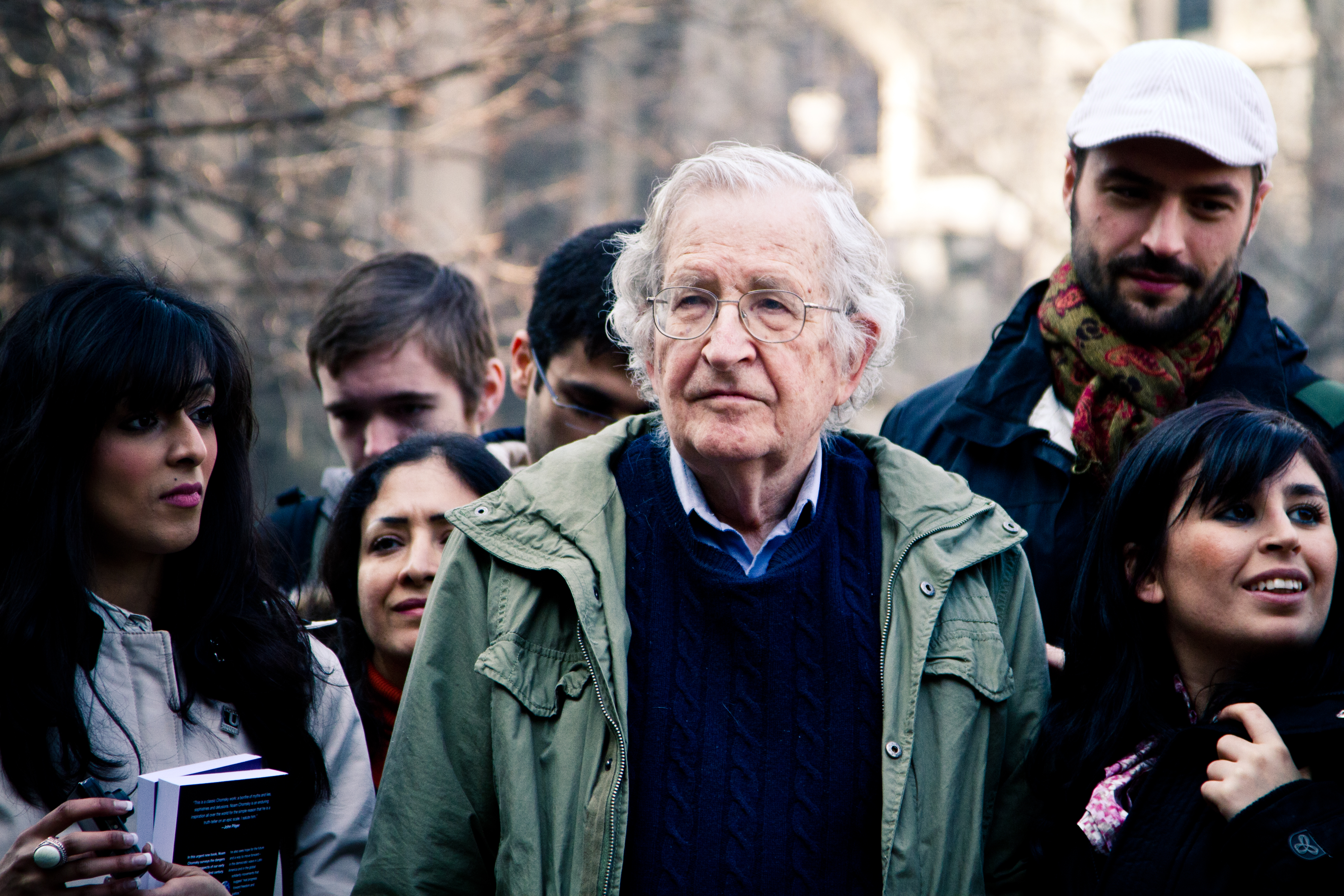 Noam Chomsky